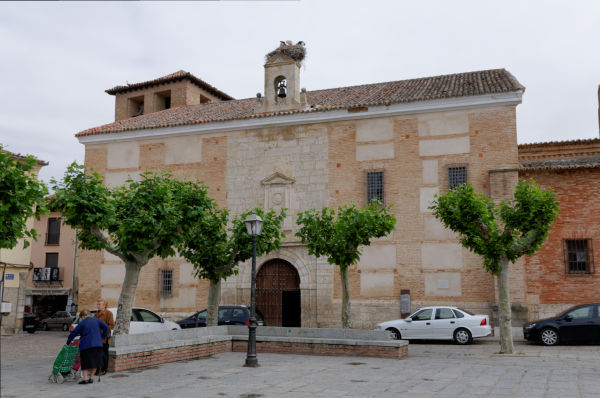 Iglesia del Santo Sepulcro de Toro.